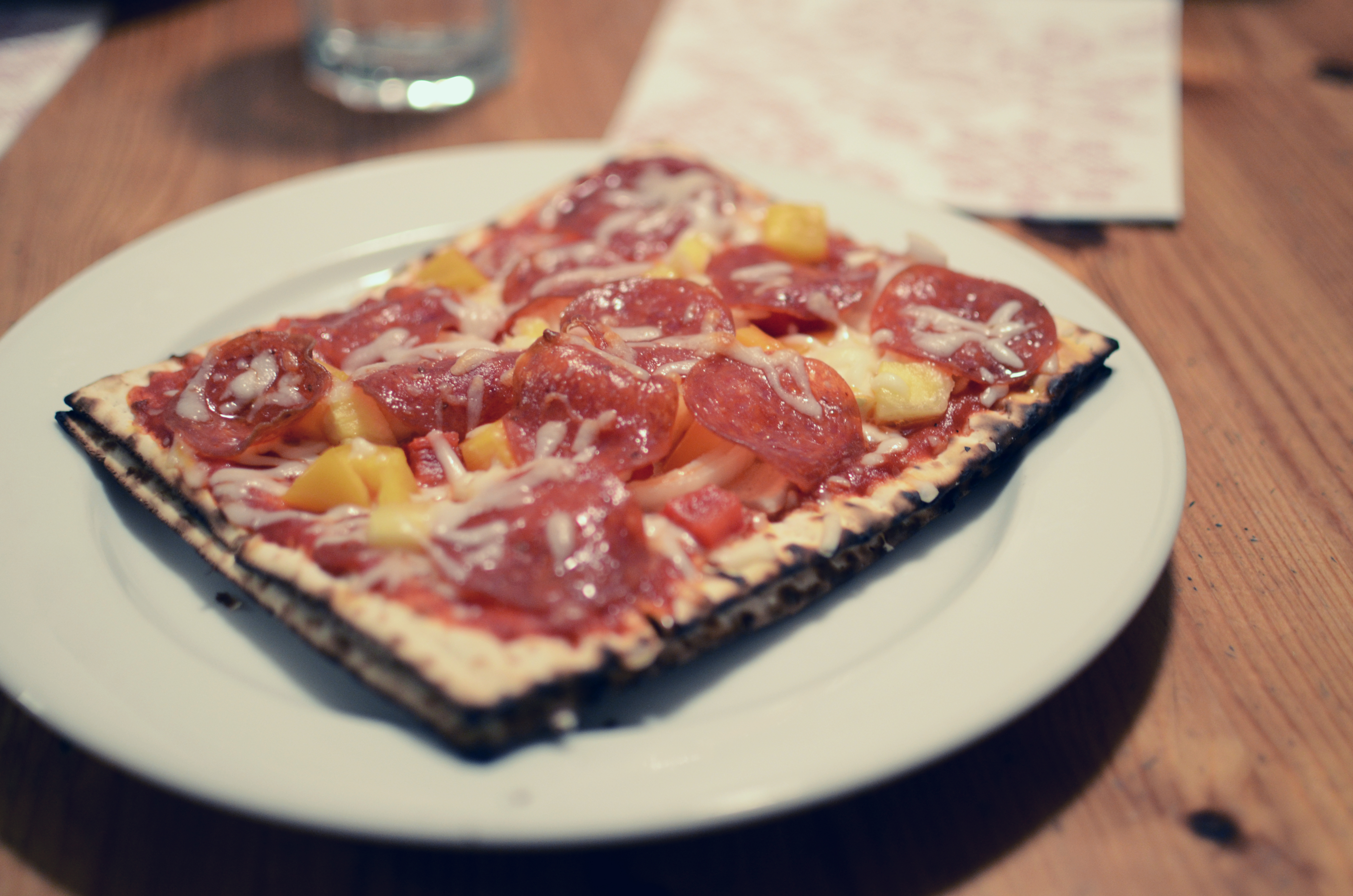 Matzo pizza